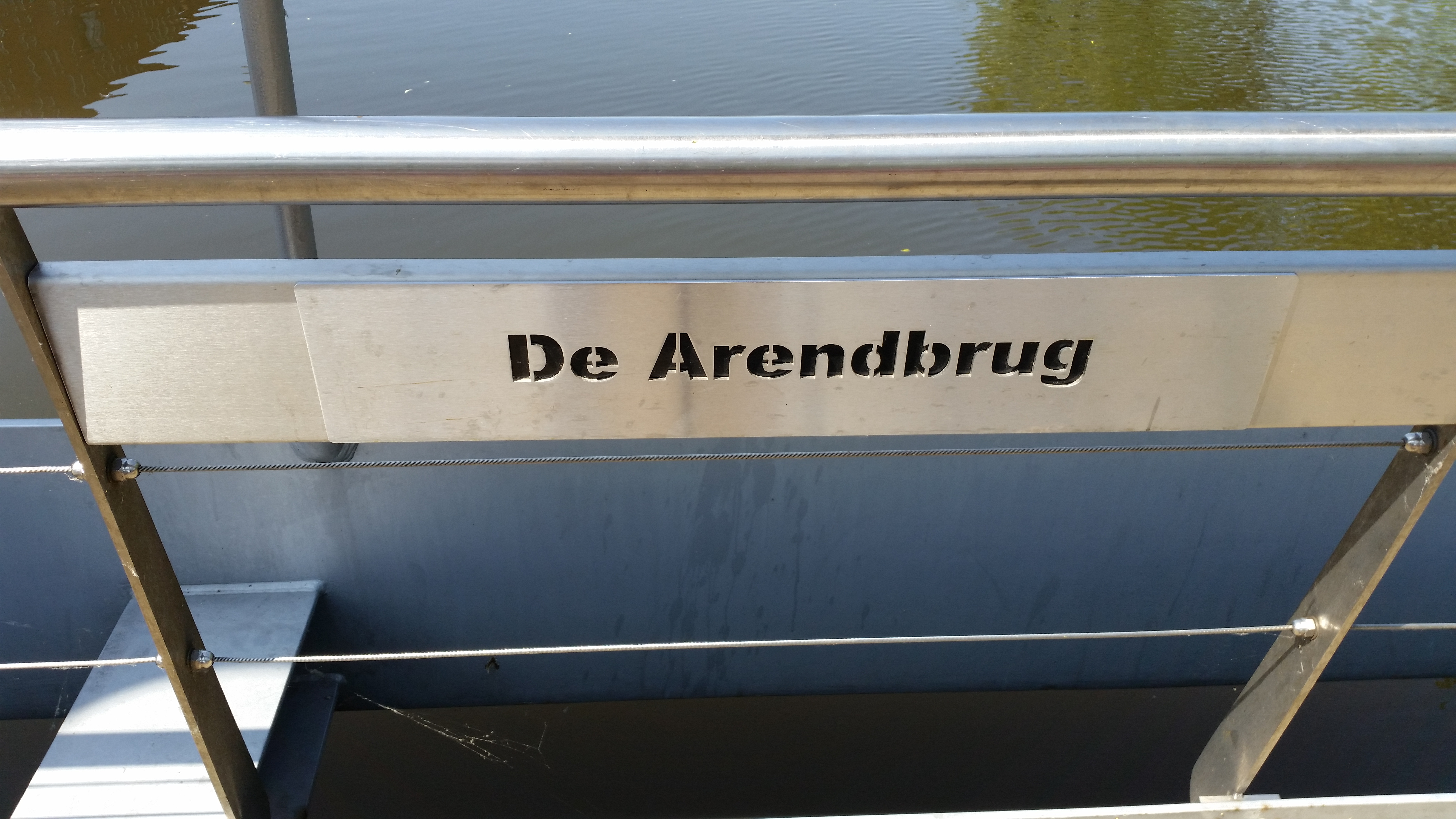 Brug 1973, De Arendbrug over de Haarlemmertrekvaart, Amsterdam; het naamplaatje